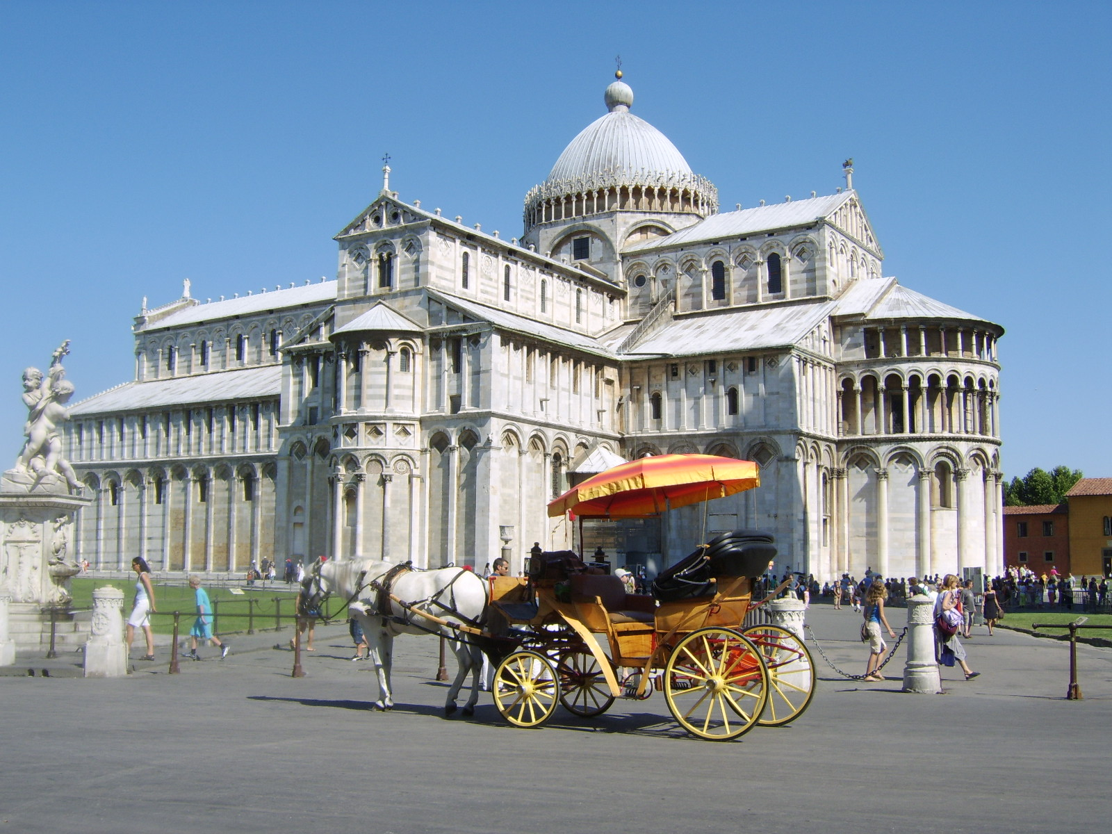 Pise, le Duomo.